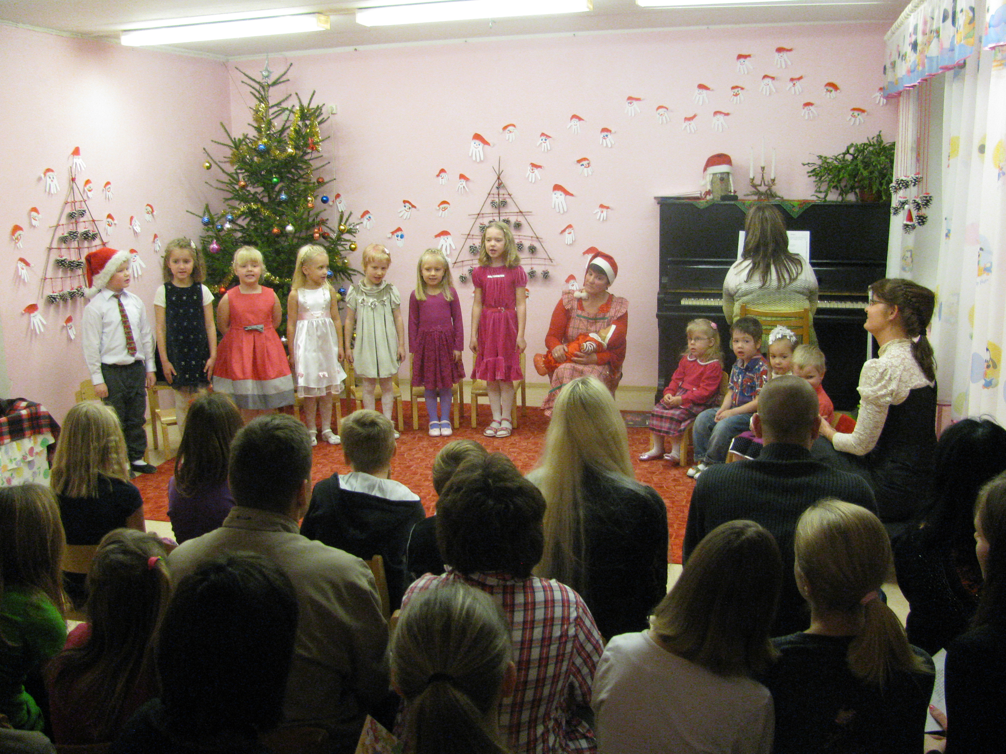 Jõulupidu Vana-Vigala lasteaias 2014. aastal